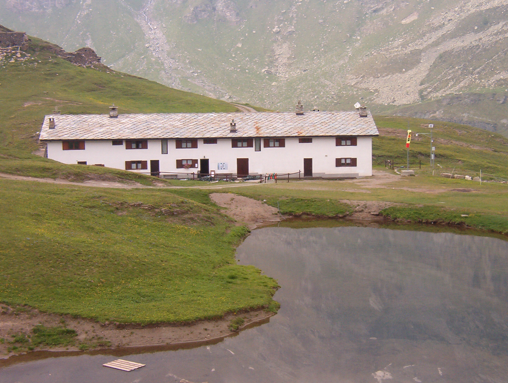 Rifugio Dondena - Valle di Champorcher - Alpi Graie - Valle d'Aosta - Italia